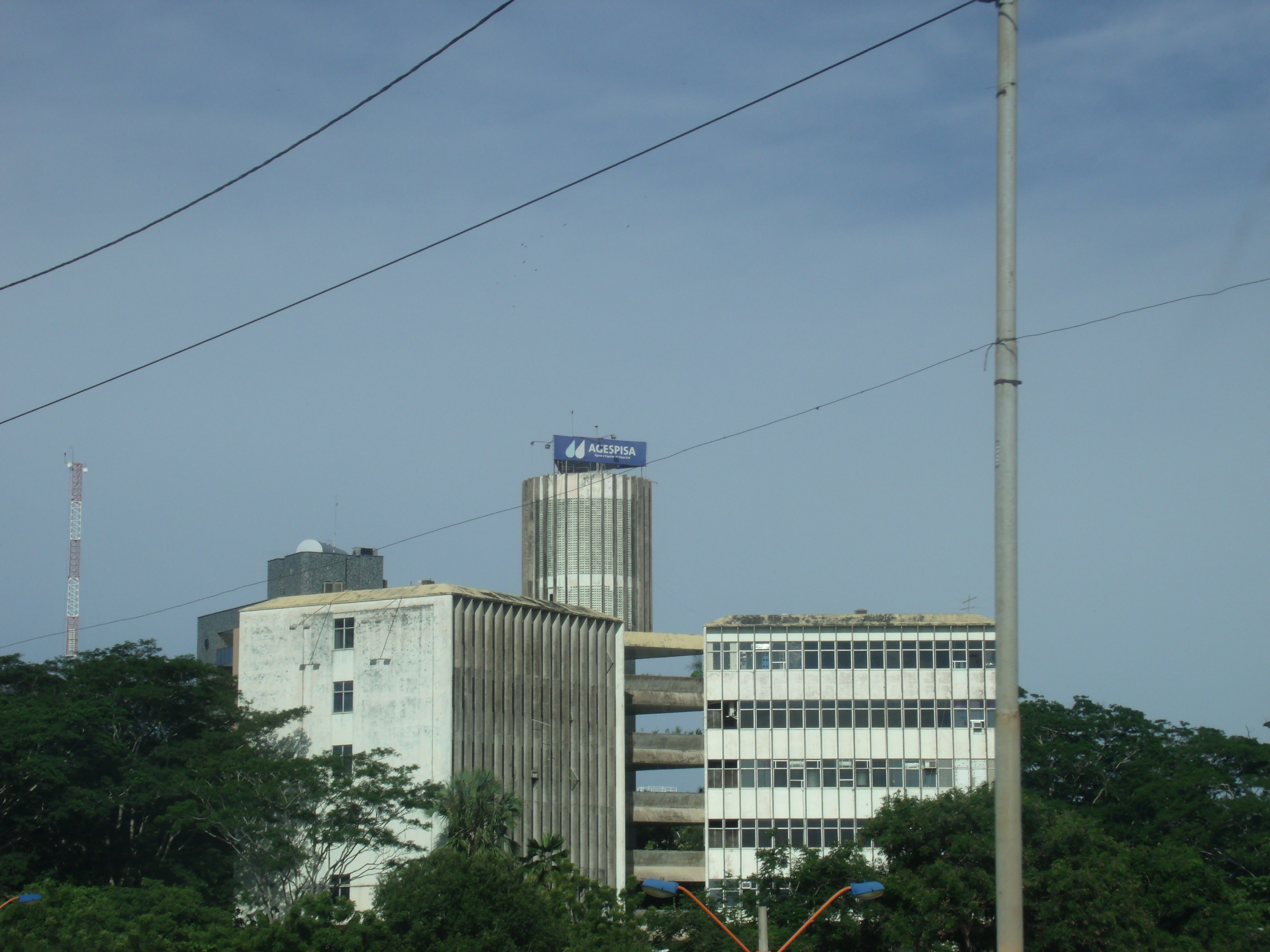 Sede da Agespisa em Teresina em foto de longe.